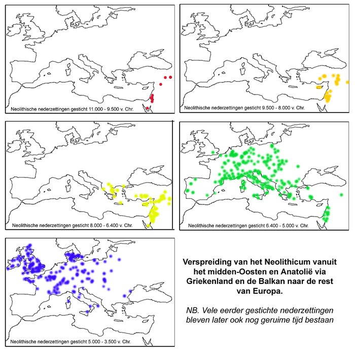 de verspreiding van (archeologische vondsten van) neolithische nederzettingen door de tijd